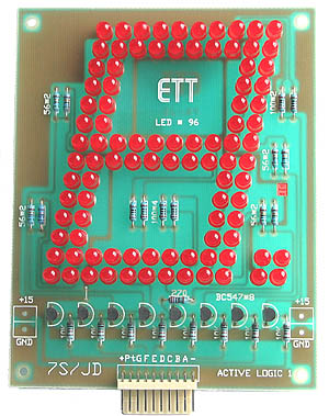 Treguesi 7 segmentor me LED dioda